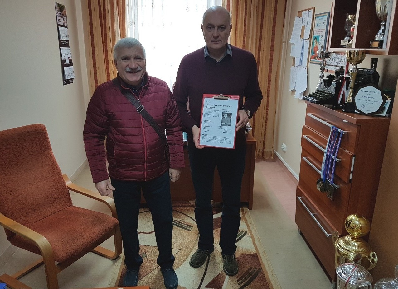 Tadeusz Gutowski,red. Wikipedii